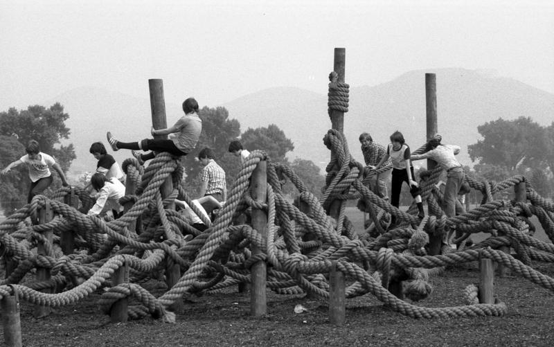 Bundesgartenschau in Bonn